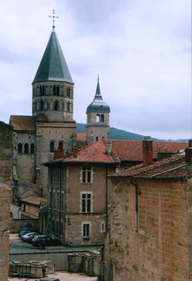 Mâcon, Burgundia, Francja